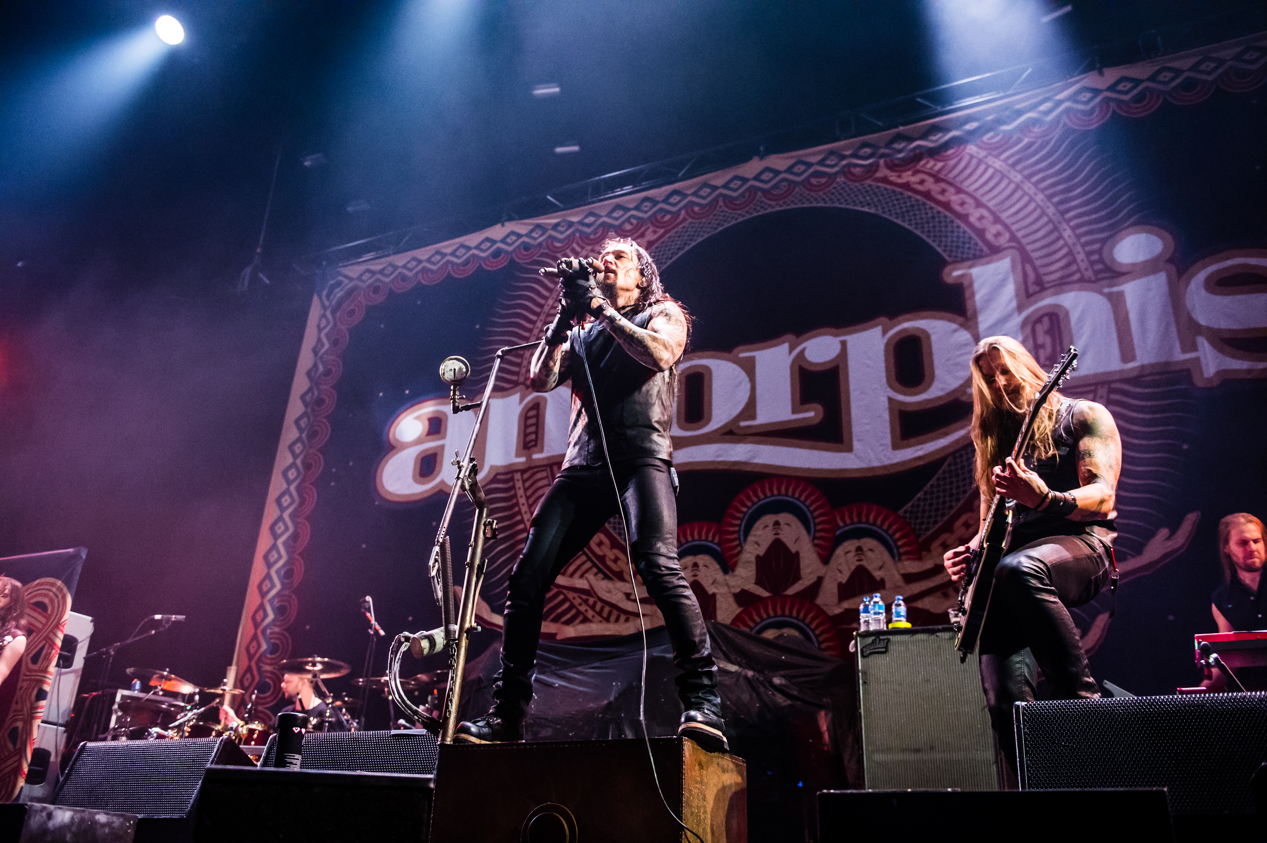 'Amorphis - Support für Nightwish Endless forms most beautiful Tour 2015 Oberhausen'